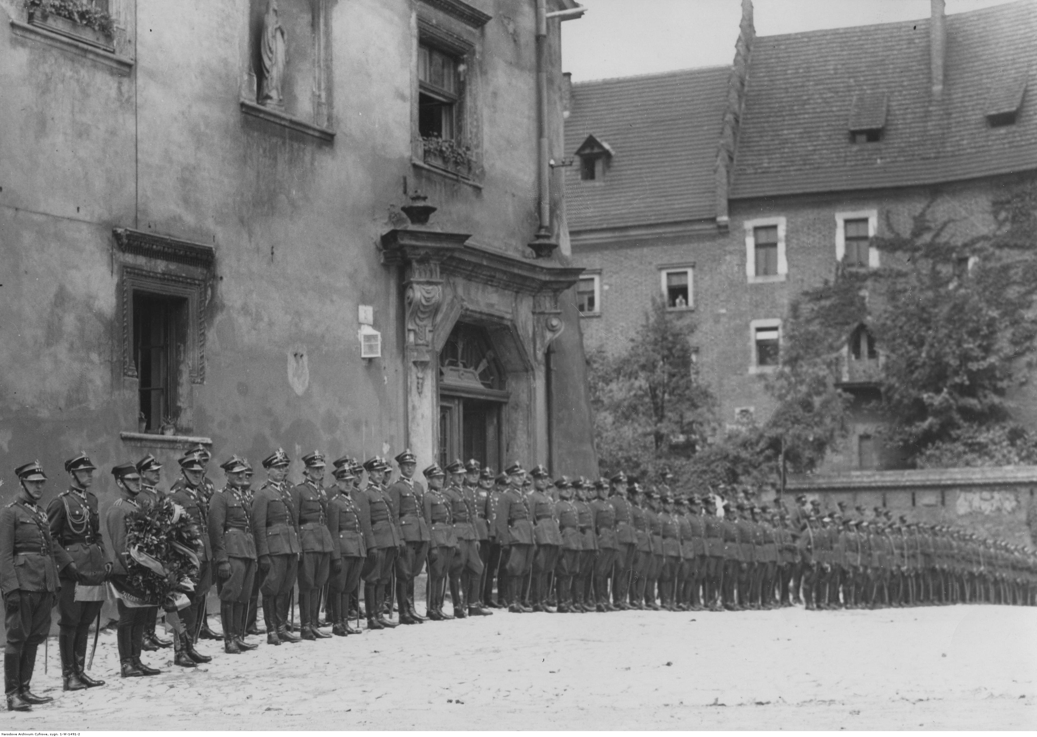 Artylerzyści z 4 Pułku Artylerii Lekkiej z Inowrocławia na Wawelu; 1936 r. Koncern Ilustrowany Kurier Codzienny - Archiwum Ilustracji. Sygnatura: 1-W-1491-2